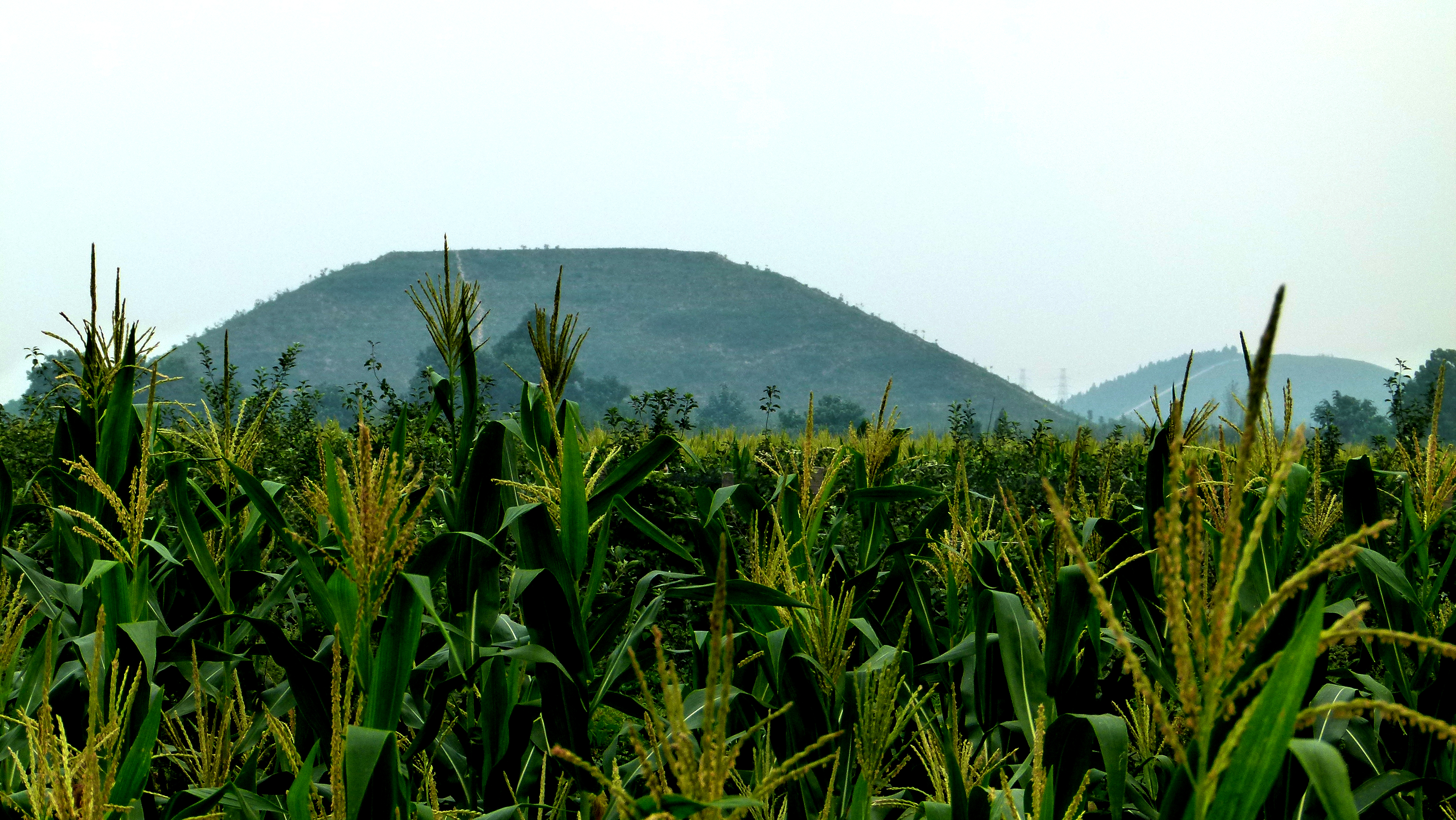 Pingling - Gräber von Kaiser und Kaiserin